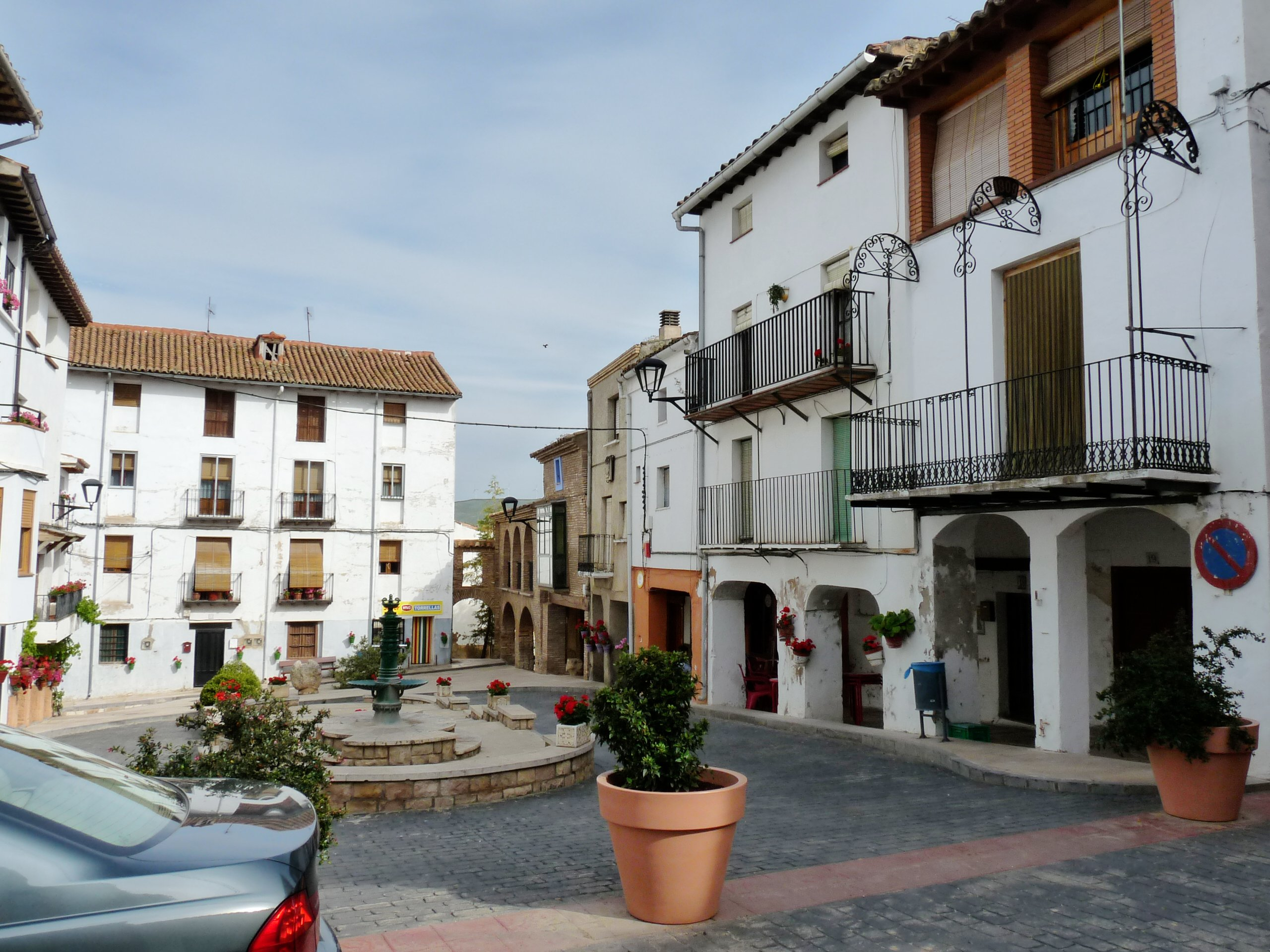 Torrellas - Plaza del mercado; porticada